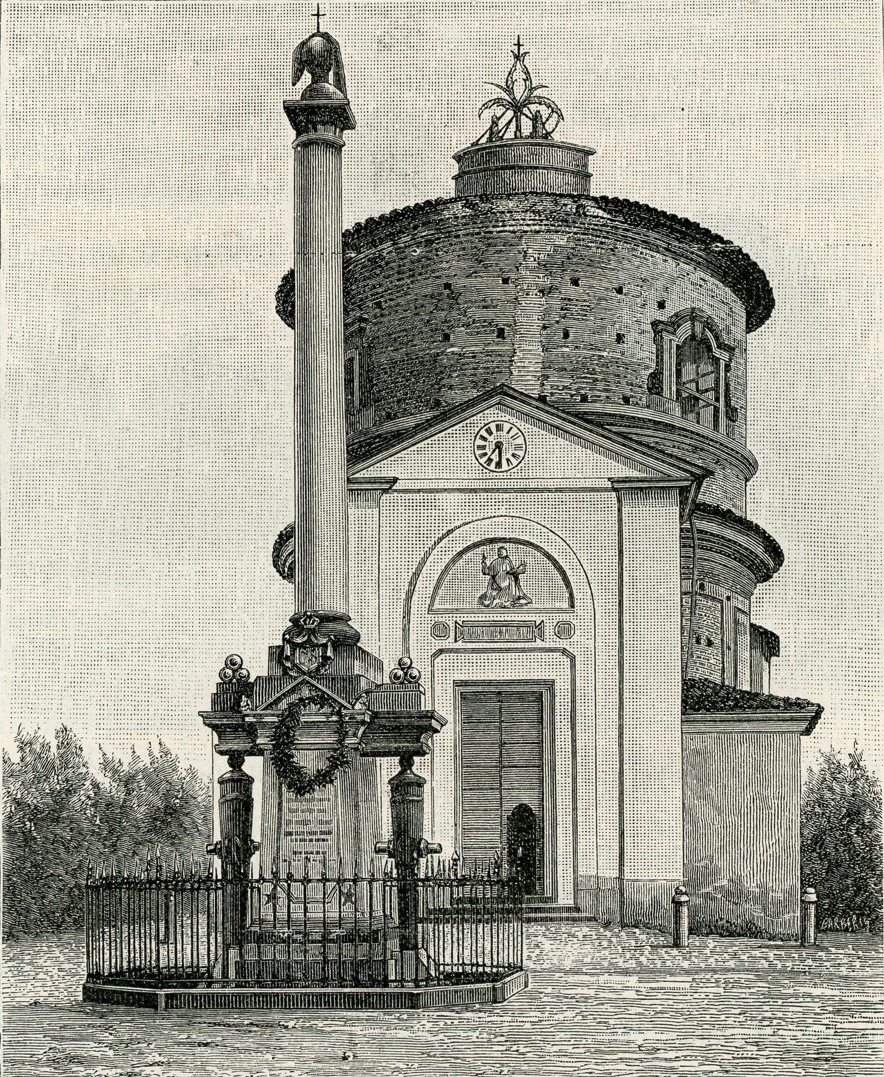 Magenta: monumento commemorativo della battaglia del 4 giugno 1859 (xilografia di Giuseppe Barberis).